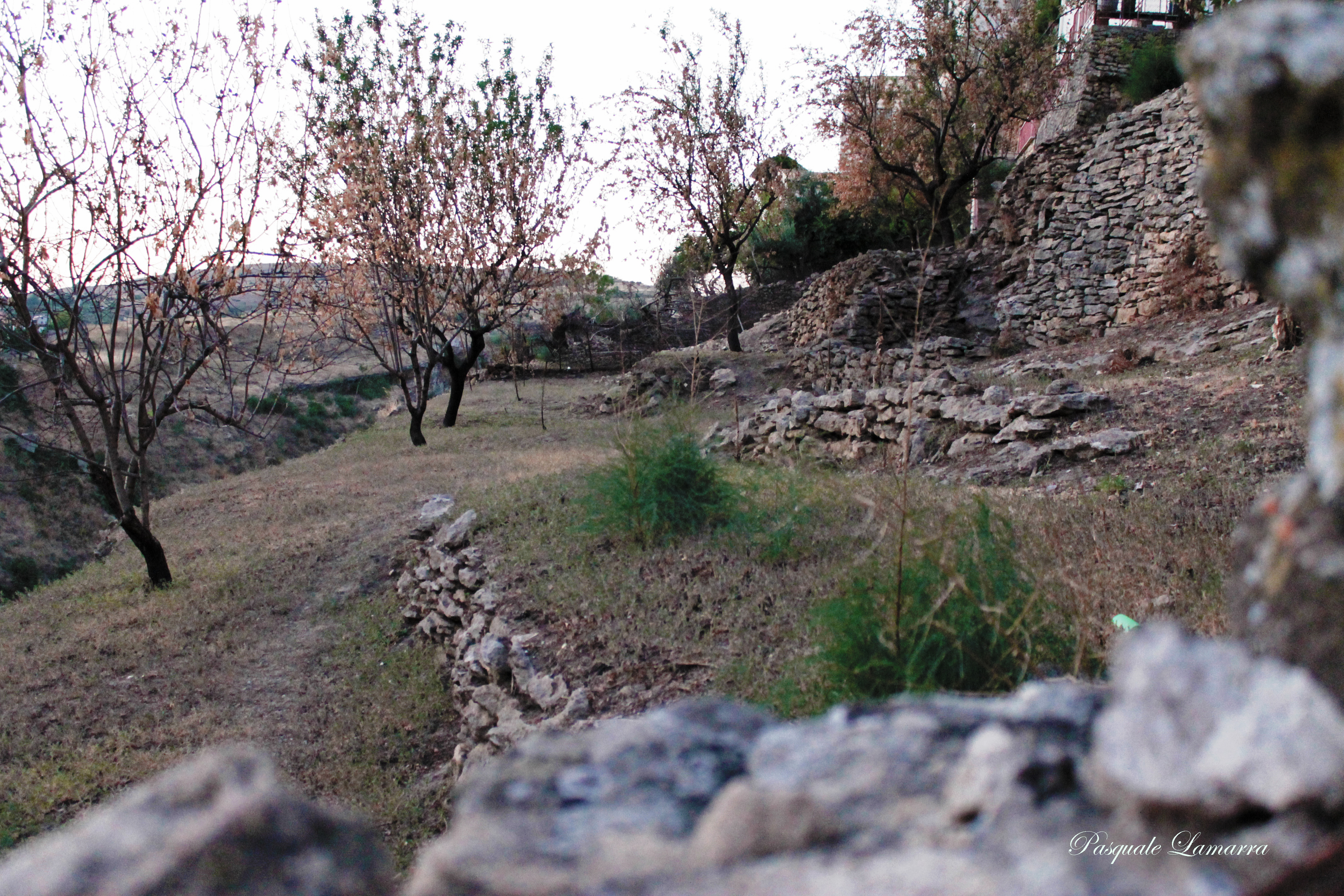 Terrazzamenti di manifattura araba, per agricoltura in zone impervie